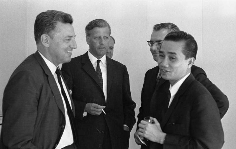 MdB Blumenfeld (links) gibt Empfang für Parlamentarier aus Vietnam. Vizepräsident des Parlaments Nguyen Ba Can im Restaurant "Am Tulpenfeld"